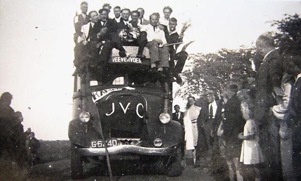 Het kampioensteam van J.V.C. Julianadorp. De ploeg werd het seizoen 1945/46 kampioen van de Eerste klasse NHVB.